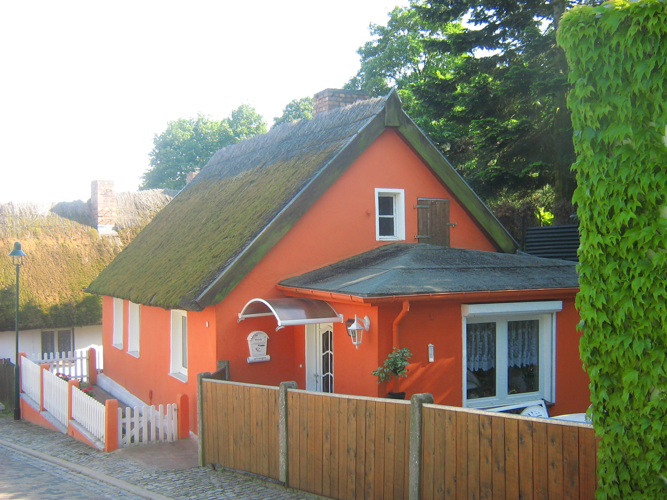 Dom w Kemminke